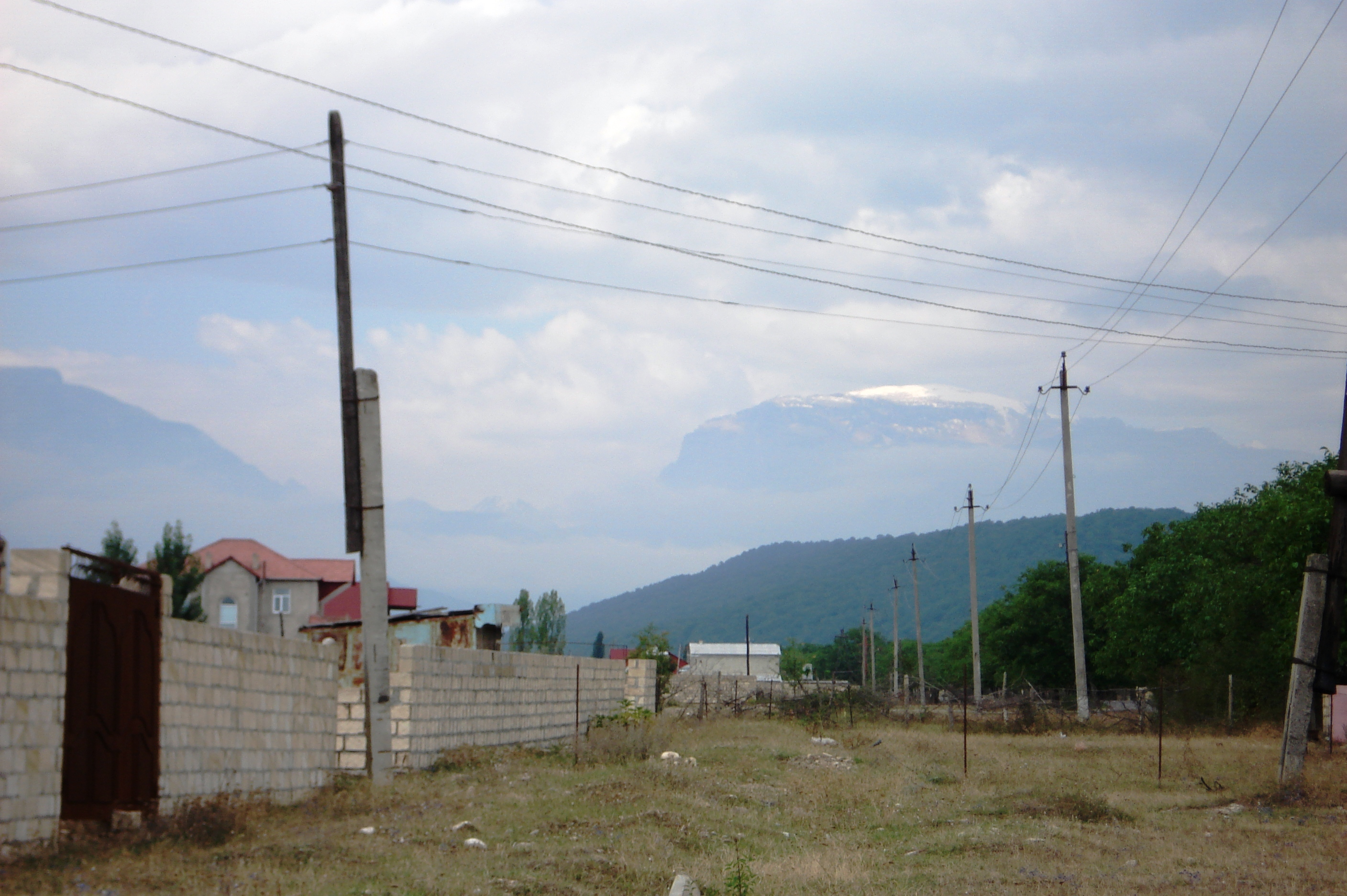 Гора Шахдаг. Вид из Кусаров